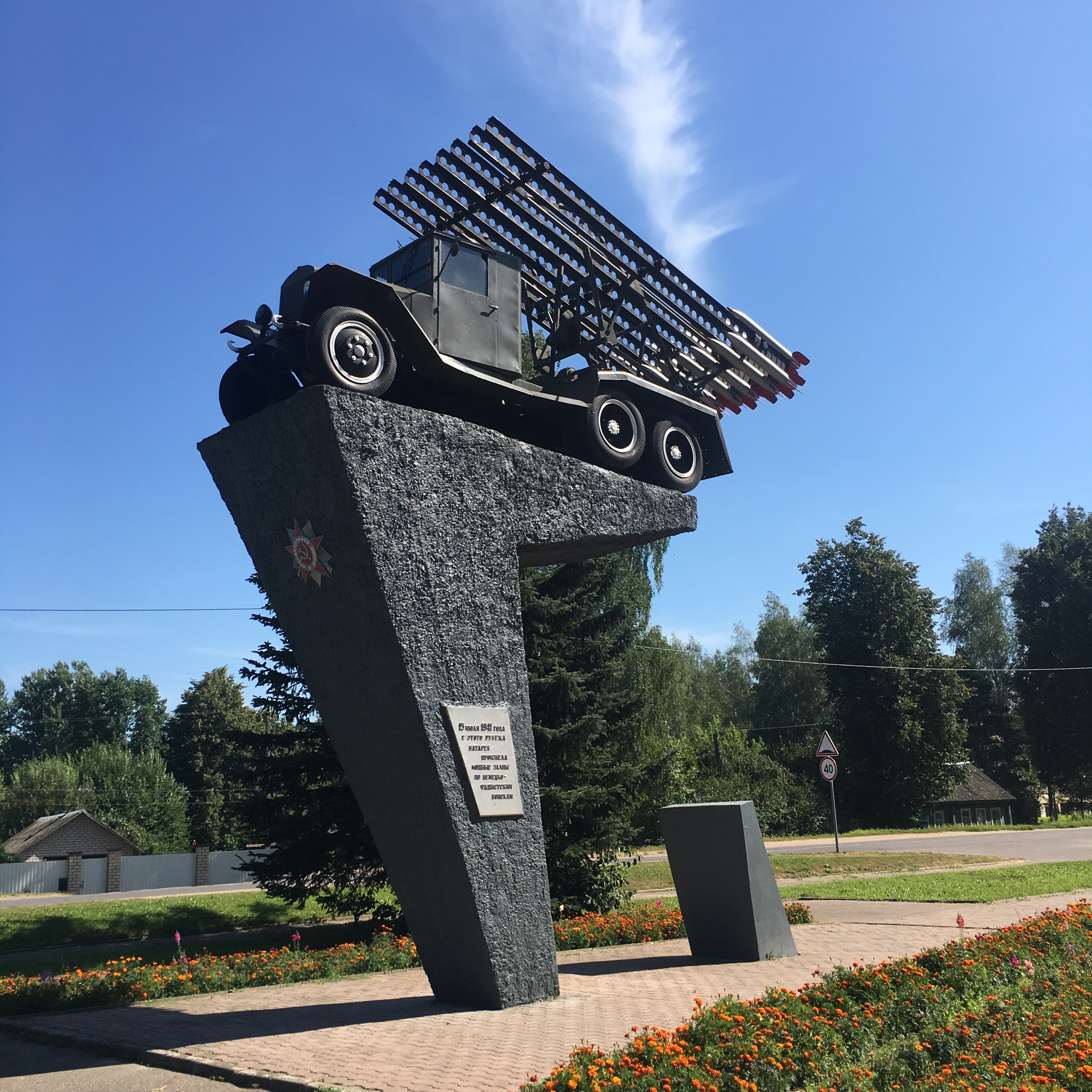 Монумент «Катюша» в Рудне